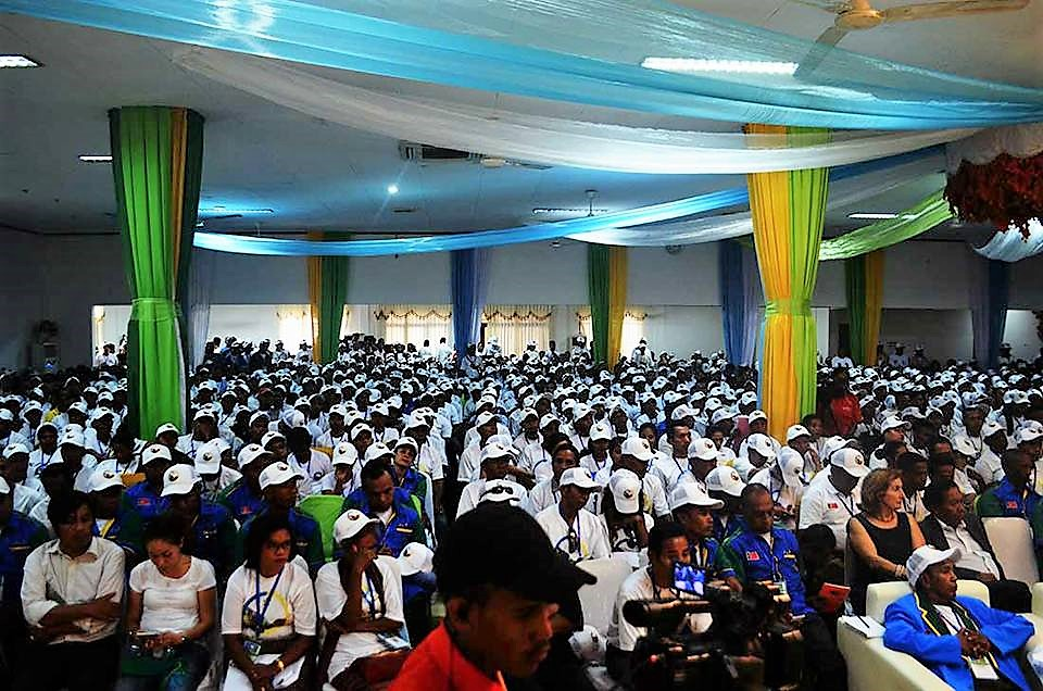 Erster Nationalkongress der PLP, Osttimor